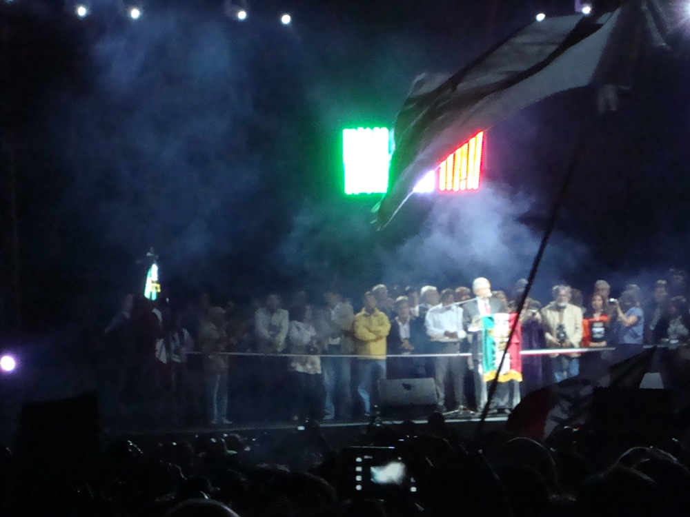 Andrés Manuel López Obrador, político de izquierda y ex candidato a la presidencia mexicana en 2006, pronuncia su discurso en el marco del Grito de los Libres. El acto se celebró en la plaza de las Tres Culturas de Tlatelolco el 15 de septiembre de 2010.